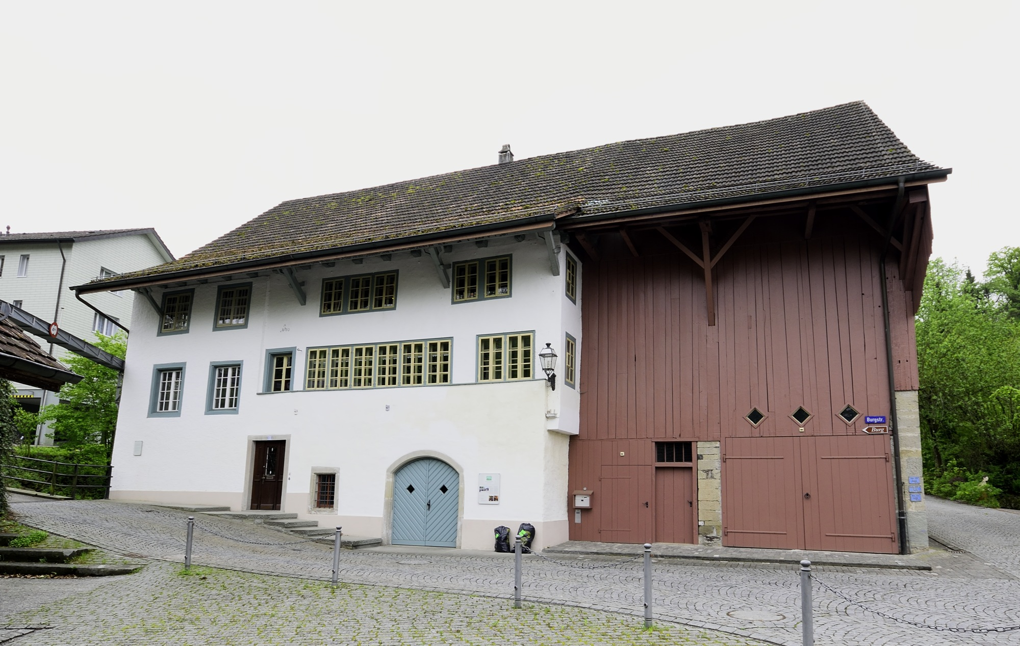 Flarzhaus, Hausteil 2, ID 19500268